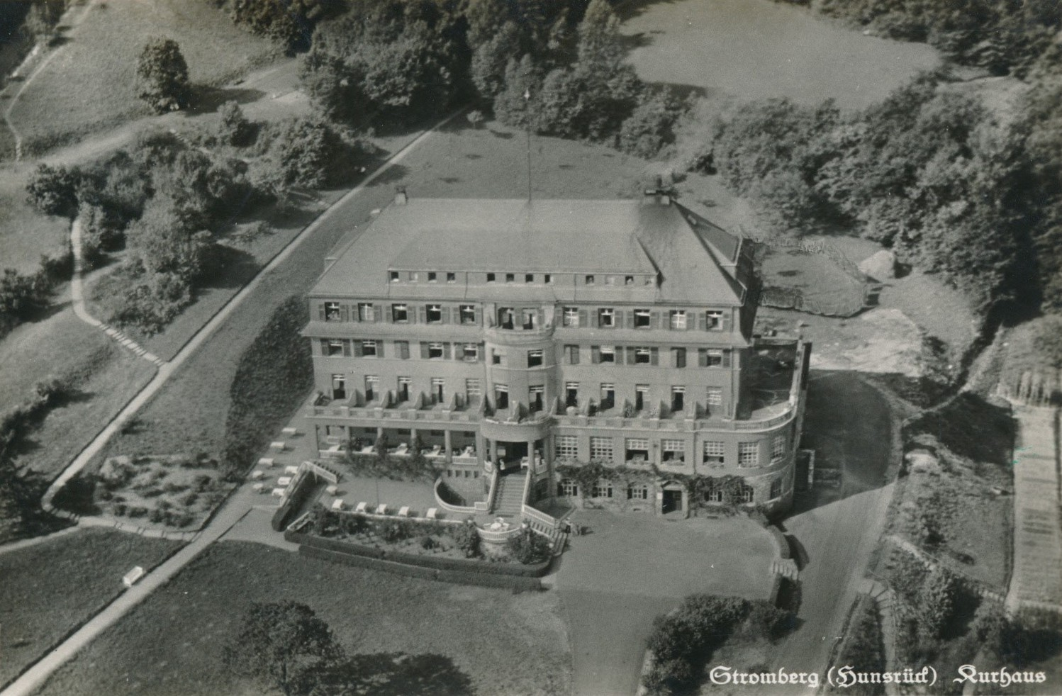 Kurhaus Stromberg 1939